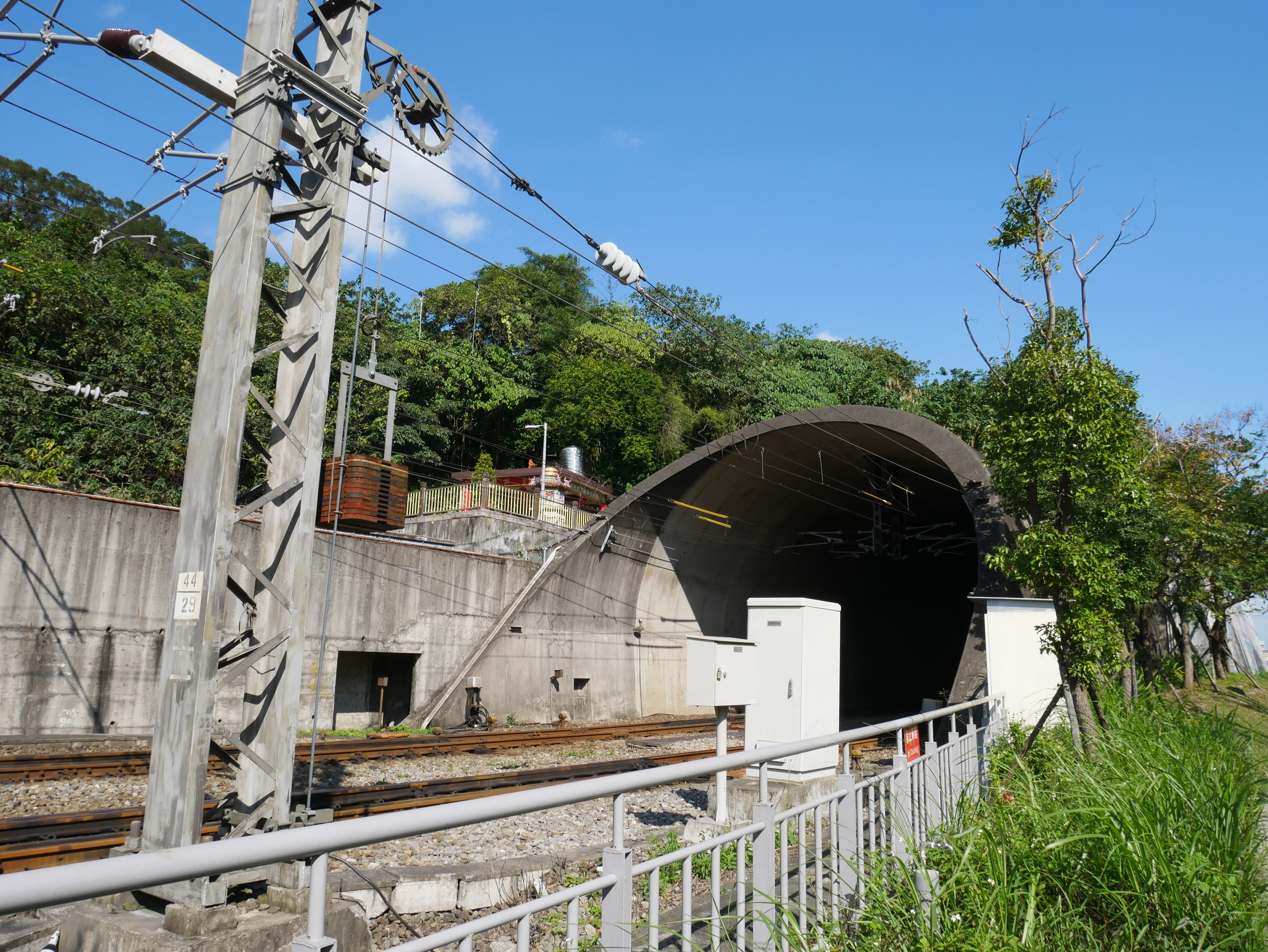 臺鐵山佳隧道，新北市樹林區中山里